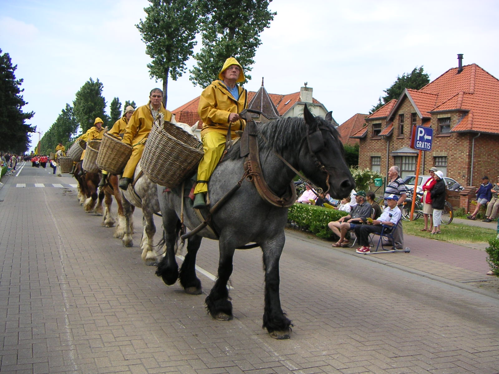 Pecheur de crevettes à cheval - ODK